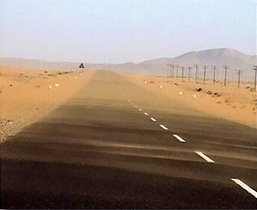 Straße durchs Diamantensperrgebiet, Namibia